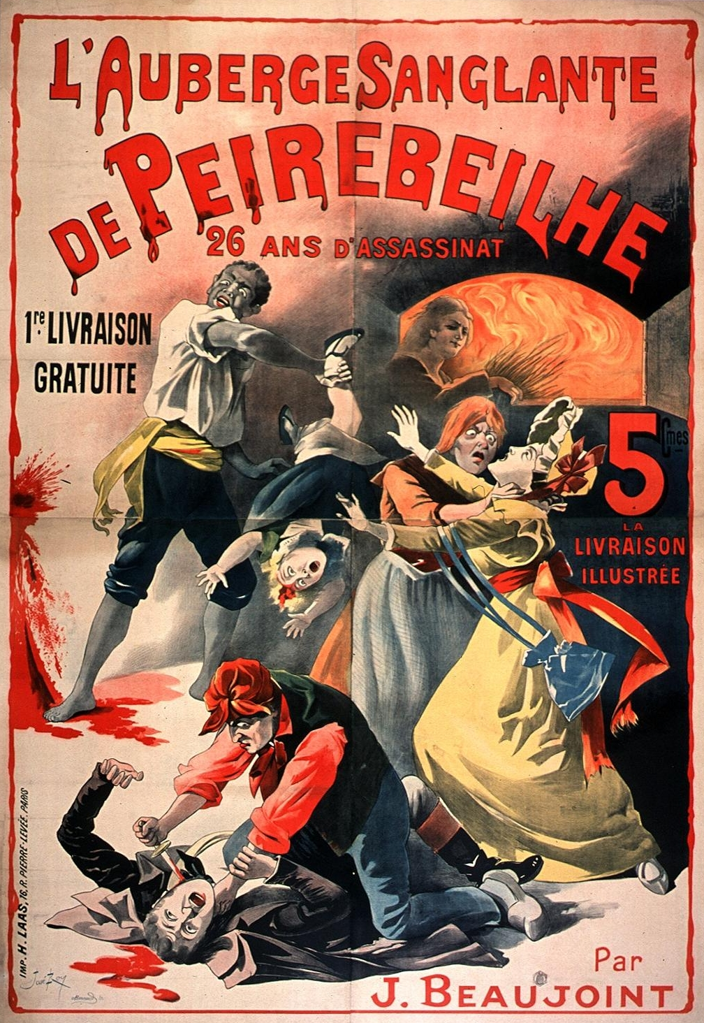 L'Auberge sanglante de Peirebeilhe by Jules Beaujoint (1830-1893)